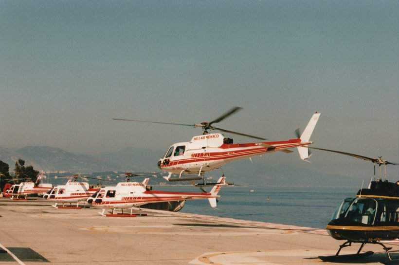 Heliport Monaco 3